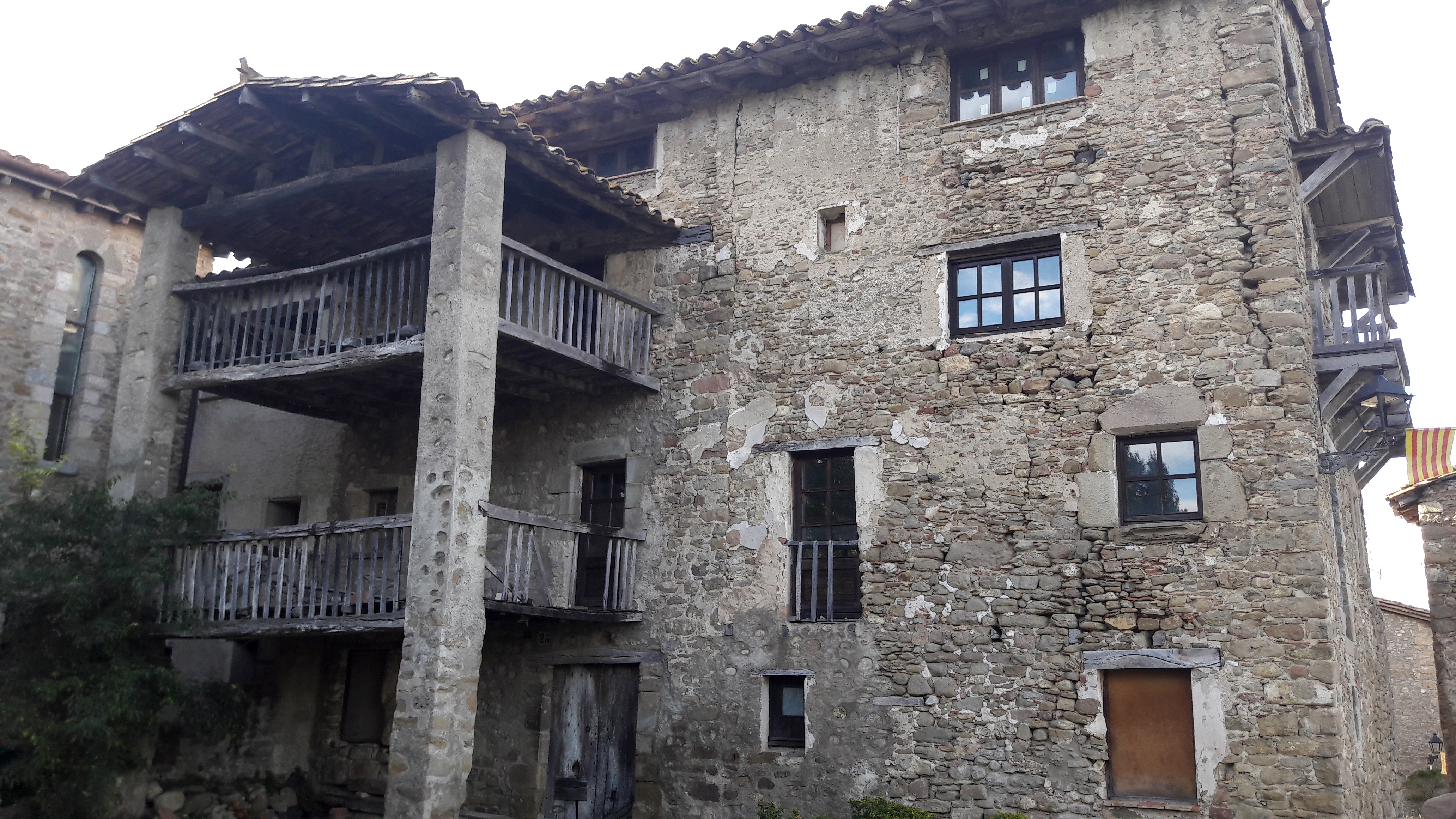 Llindes conservades de la casa al barri de Romeria, 26 (Mieres)